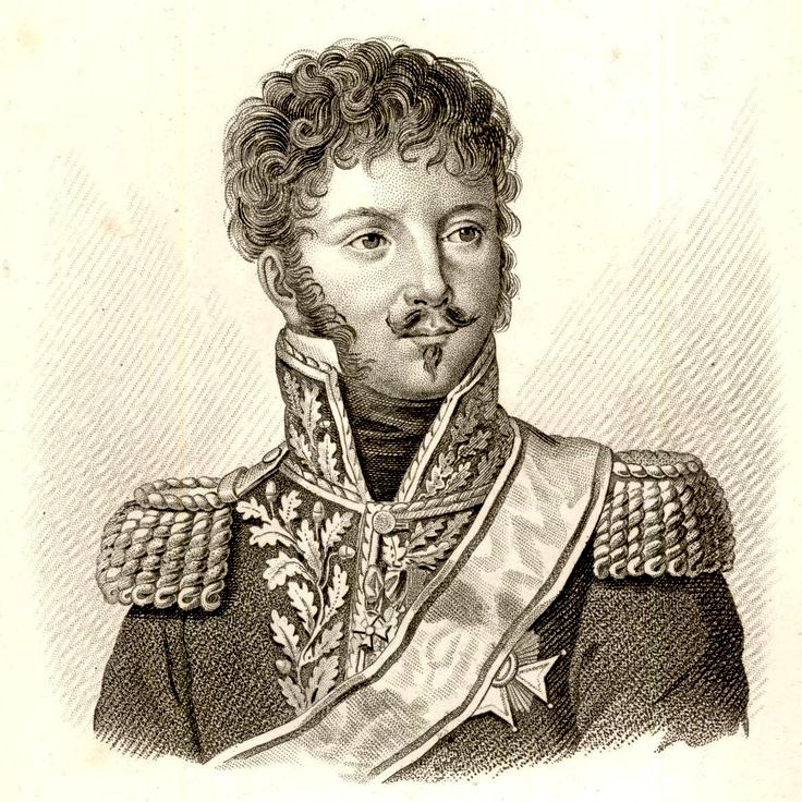 Général_Louis_Pierre_Montbrun